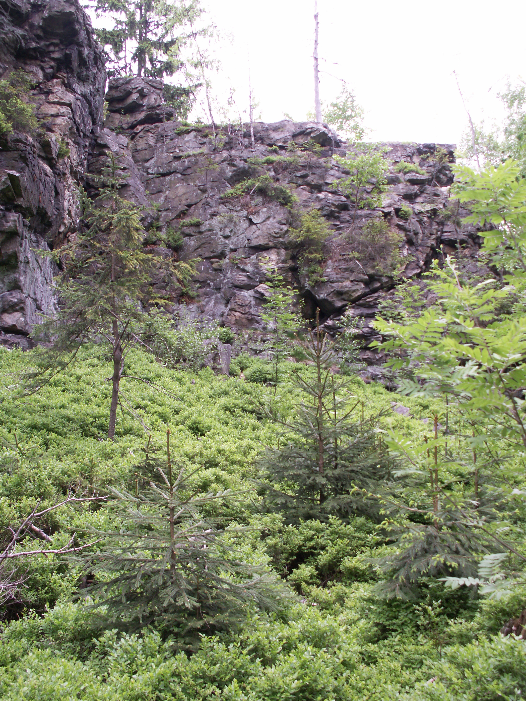 přírodní rezervace Tisůvka, rulová skála, kóta 800 m n.m., okres Žďár nad Sázavou, kraj Vysočina